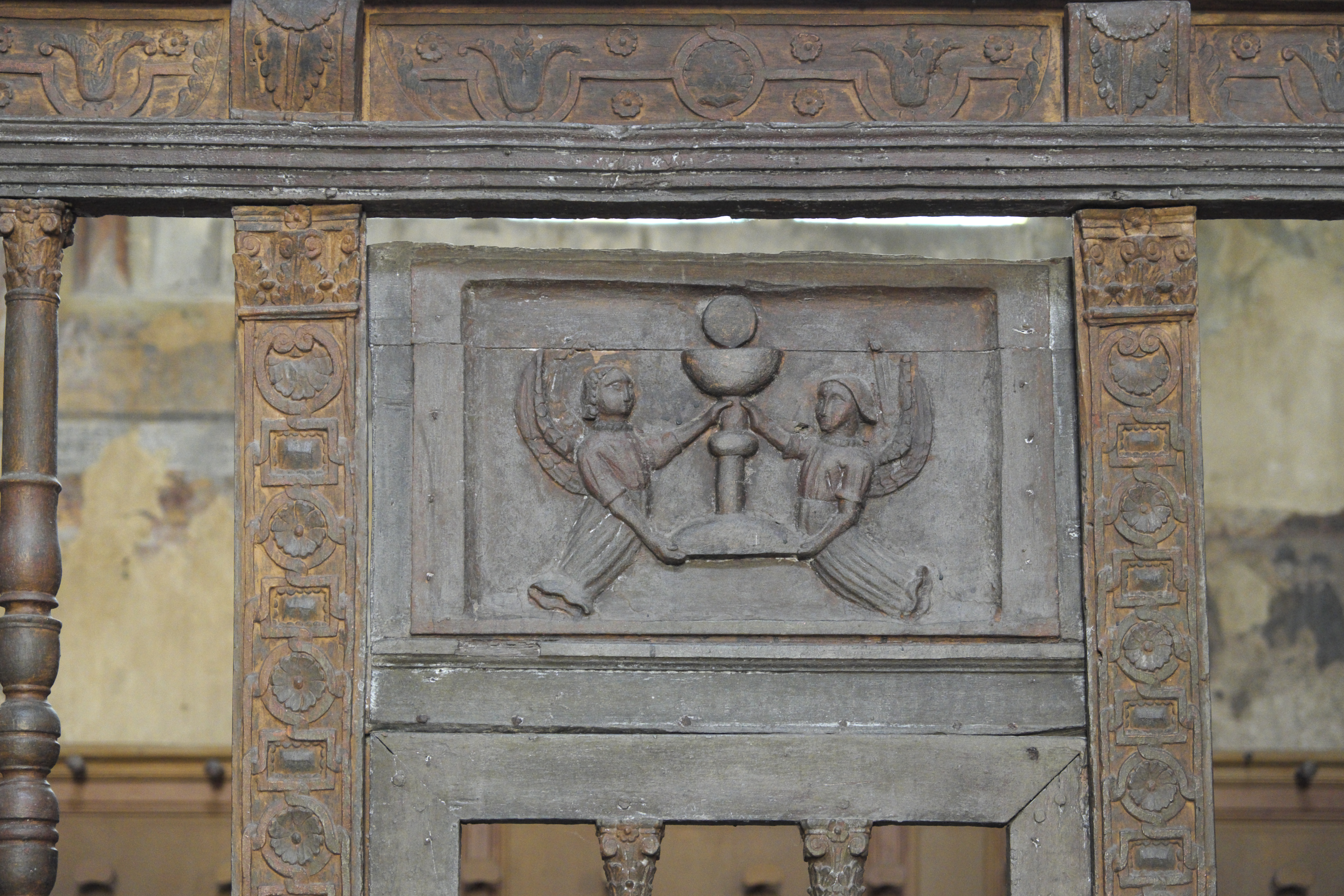 Katholische Pfarrkirche Notre-Dame in Vétheuil im Département Val-d’Oise in der Region Île-de-France (Frankreich), Holzschranke in der Chapelle de la Charité aus der Mitte des 16. Jahrhunderts